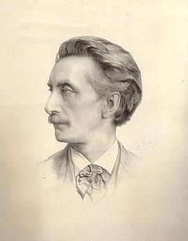 Multatuli (Eduard Douwes Dekker), door August Allebé/L. Mertens (1874).